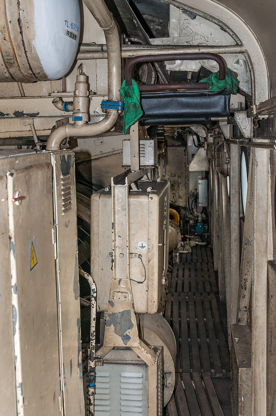 Strojovna muzejní lokomotivy T478.3001 (753.001)